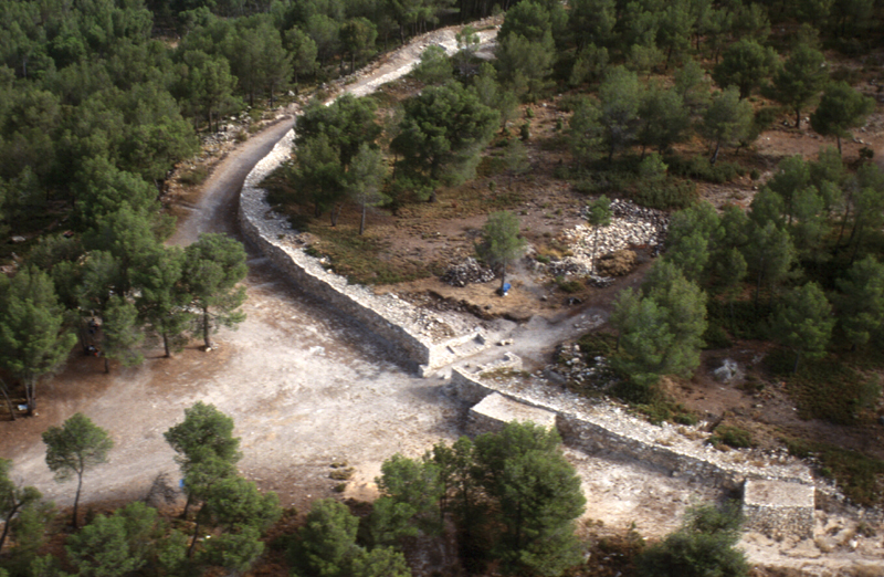 Foto aérea de la muralla y la parte oeste del poblado ibérico de La Bastida de les Alcusses.